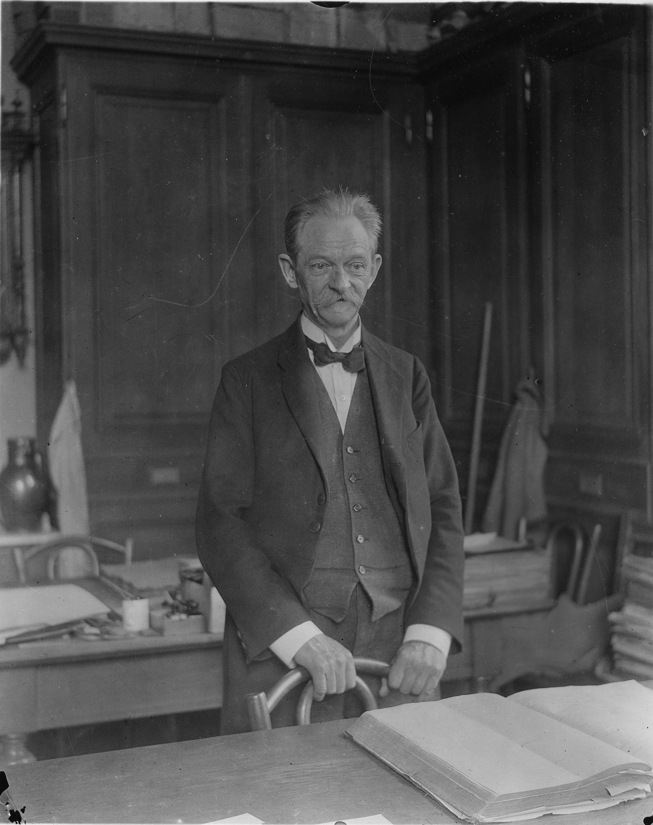 Edvín Bayer, botanik, a muzeolog